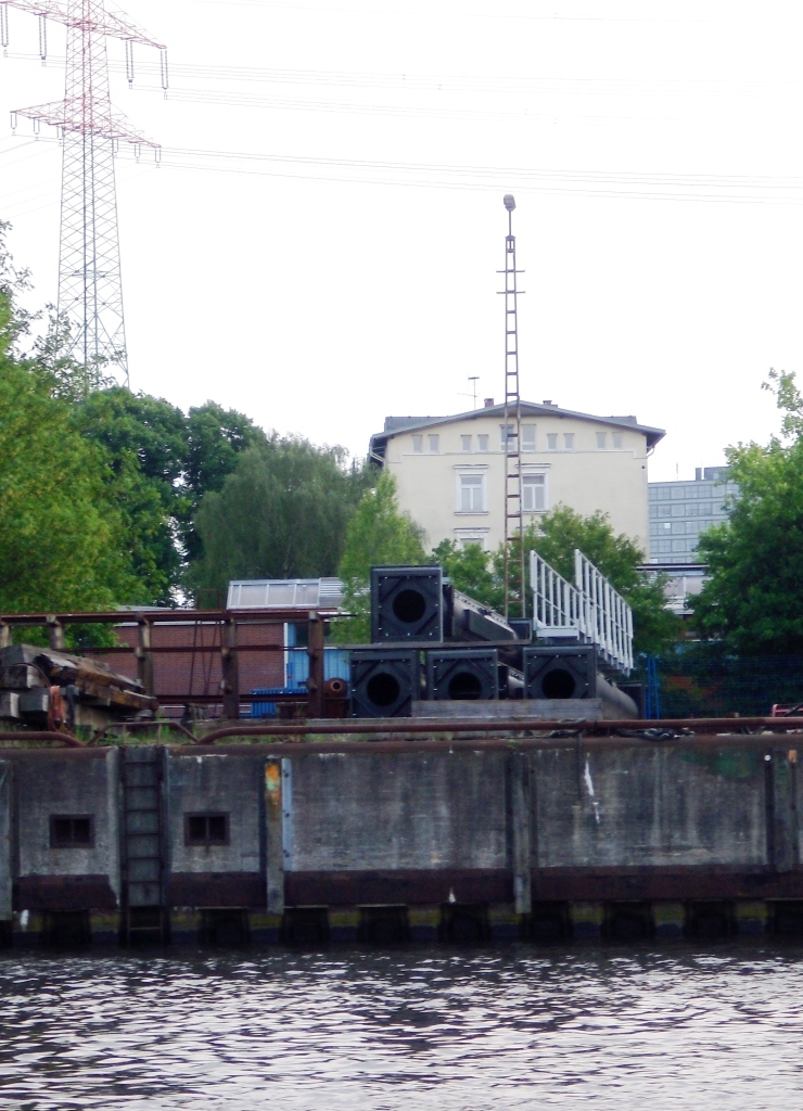 Harburger Schhloß von der Wasserseite